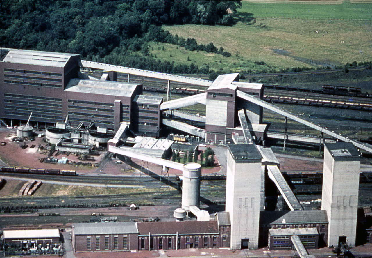 La fosse Barrois de la Compagnie des mines d'Aniche était un charbonnage constitué de deux puits situé à Pecquencourt, Nord, Nord-Pas-de-Calais, France.